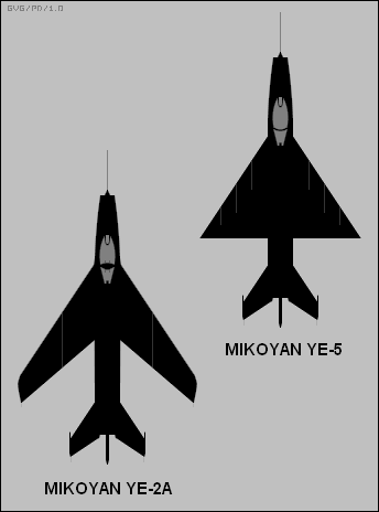 MiG-21 prototipovi